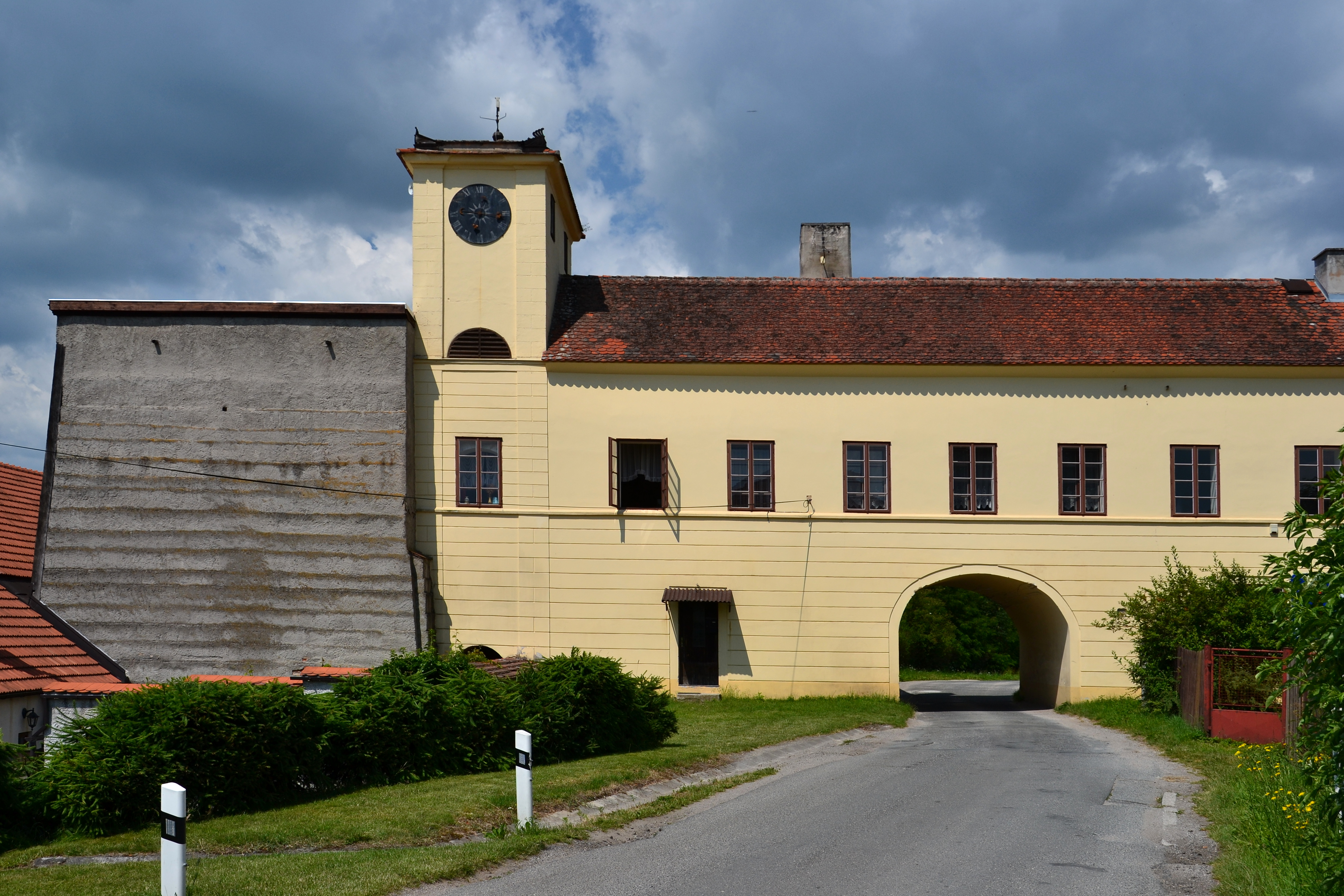 Železárna - býv. železářská huť sv. Klimenta (Plasy), Lipová 214, Plasy